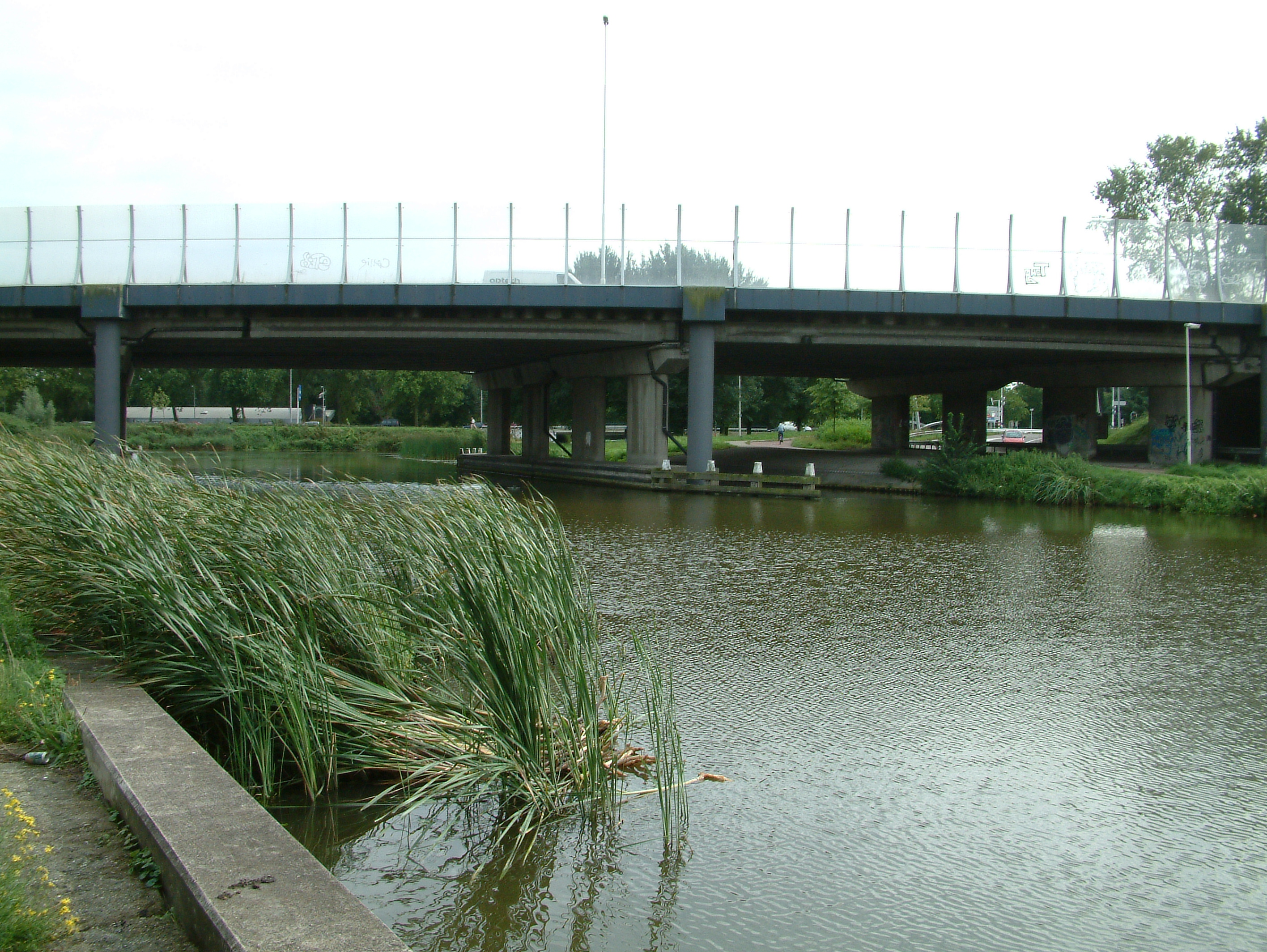 De Brug in de A20 over de Rotte